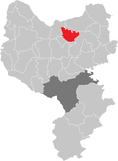 Bezirk Amstetten